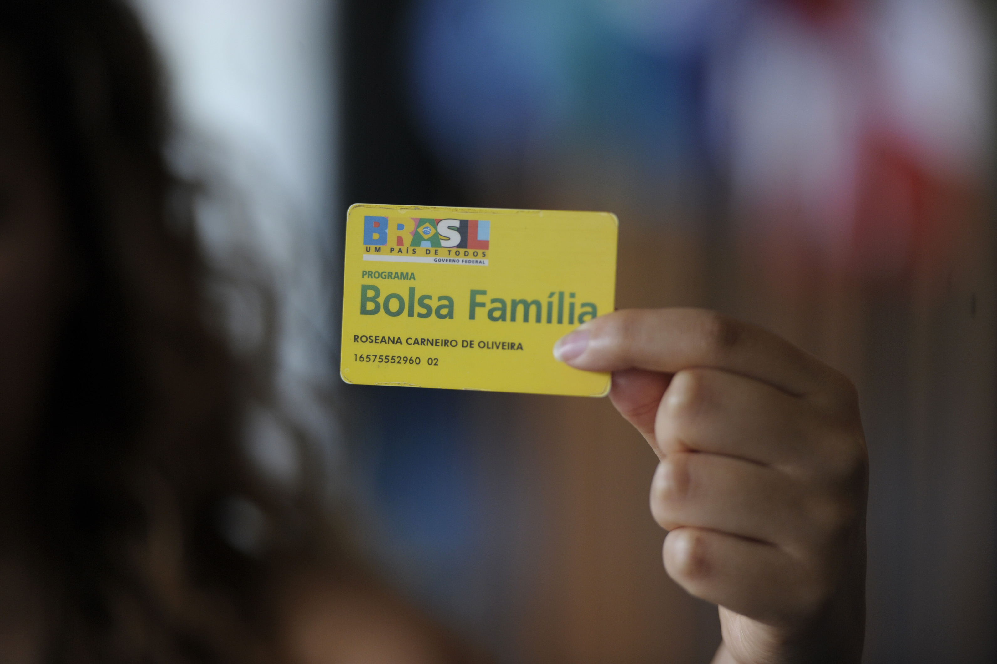 BIE - Banco de imagens externas - Está pronto para ser votado pela Comissão de Assuntos Econômicos (CAE) projeto de lei que visa a incentivar a contratação de beneficiários do Bolsa Família por empresas. De autoria do senador licenciado Alvaro Dias (PSDB-PR), a matéria tem parecer favorável, com uma emenda, do relator, senador Ciro Nogueira (PP-PI). O Projeto de Lei do Senado (PLS) 433/2008 permite que a pessoa jurídica que contratar beneficiário do Programa Bolsa Família possa deduzir valor equivalente ao benefício do Bolsa Família da contribuição patronal devida à Seguridade Social. A proposição também prevê que, necessariamente, o empregado tenha o benefício suspenso durante todo o período em que durar seu vínculo com a empresa. Foto: Jefferson Rudy/Agência Senado